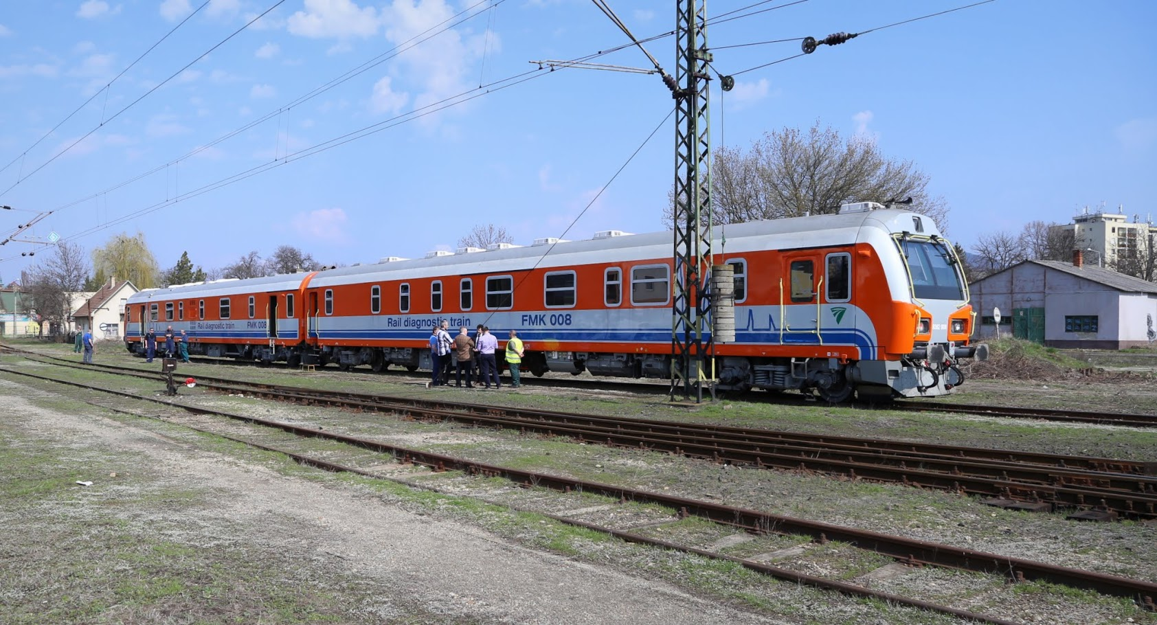 Vasúti pálya diagnosztikai szerelvény. Rail diagnostic train, FMK 008.